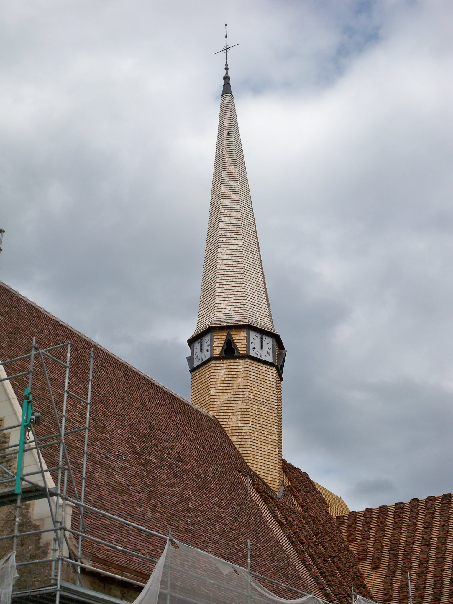 Le clocher en châtaignier de l'Église Saint-Pierre de Lavaré en cours de restauration